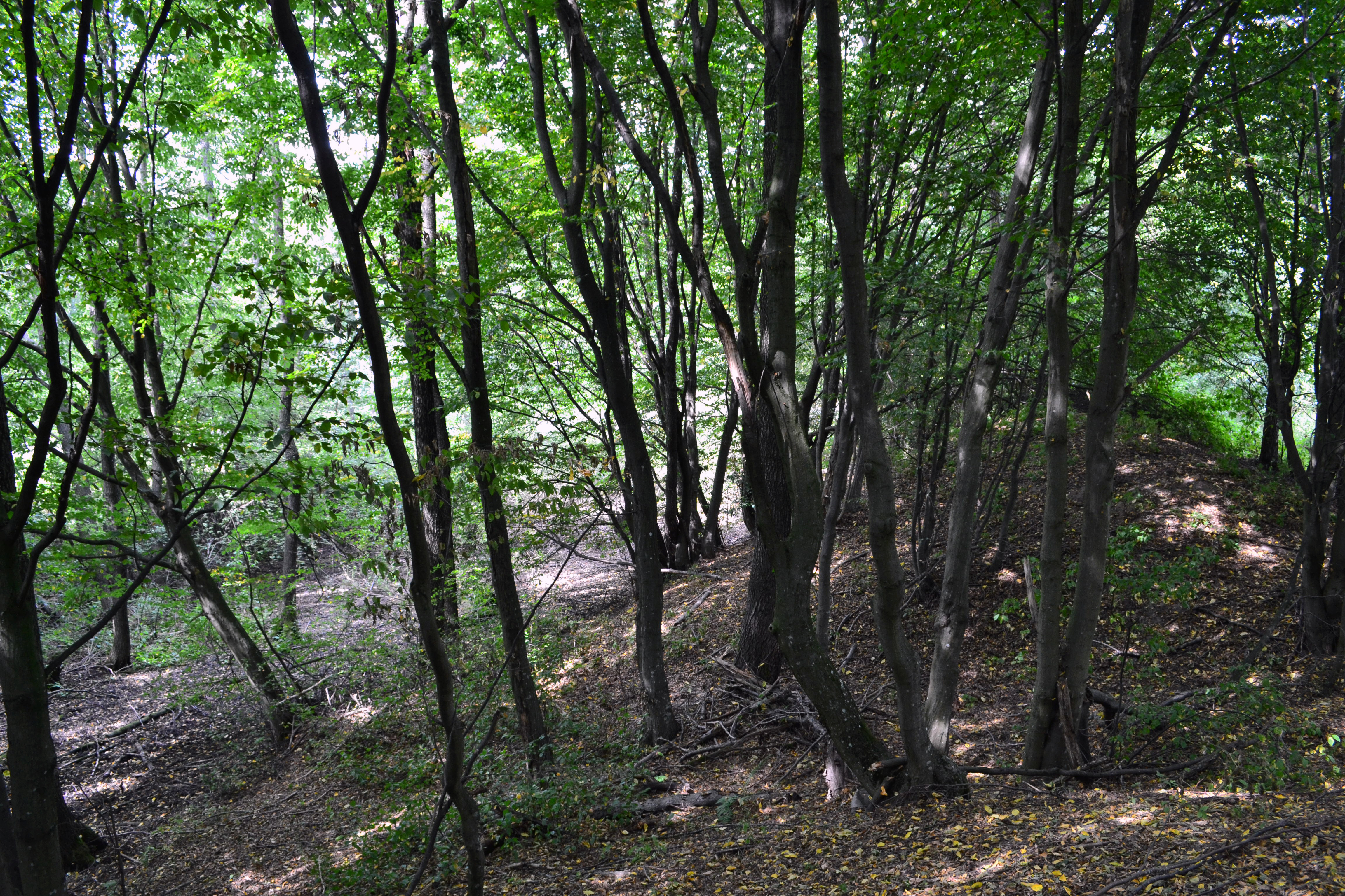 Беларуская (тарашкевіца): Рэшткі Каралеўскага замку ў Лыскаве. Заходні вал This is a photo of Belarusian heritage monument. Reference number: 113В000622 ( WLM)